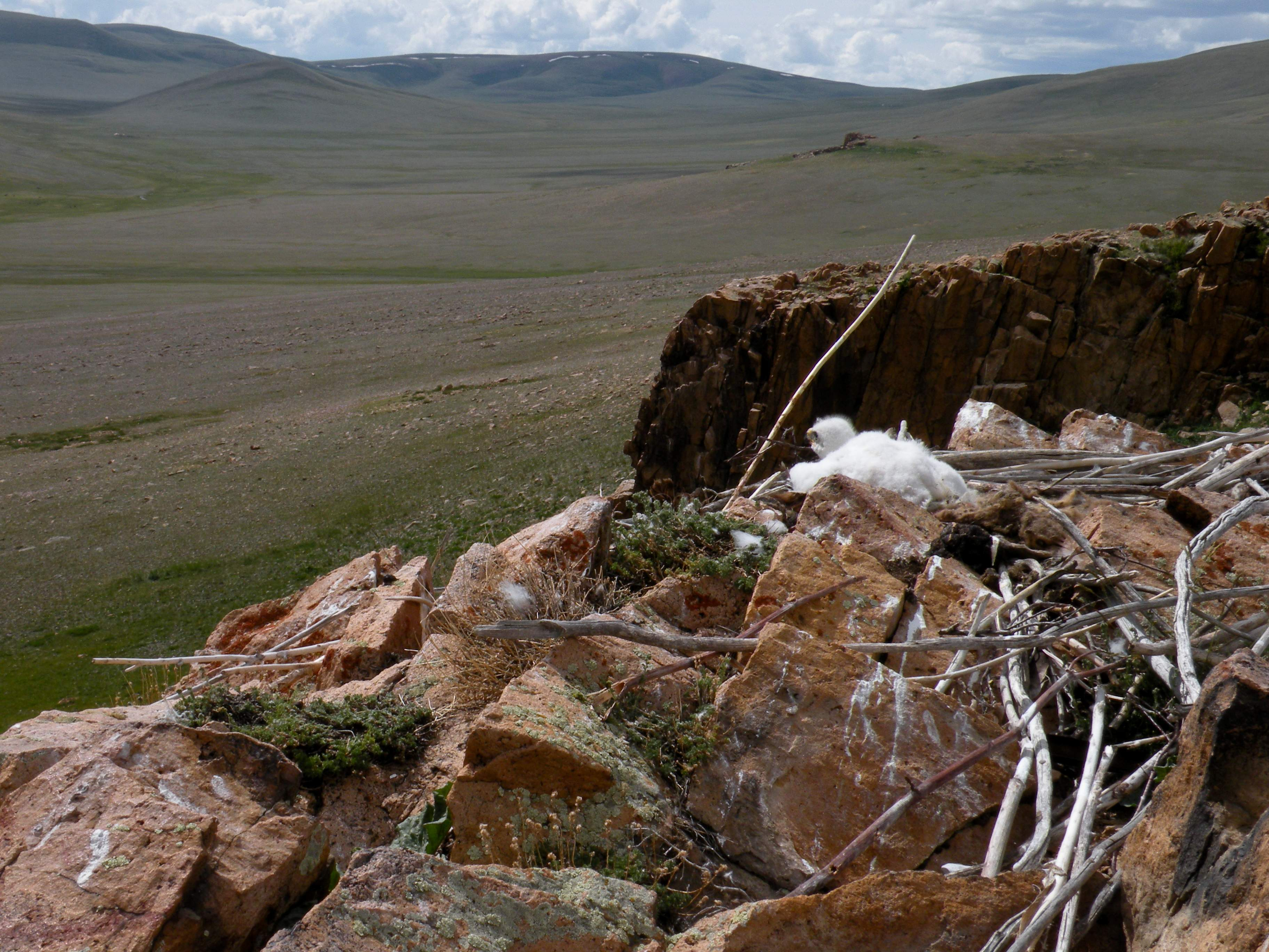 Степной орел (Aquila nipalensis). Пуховой птенец в гнезде на скальном развале на склоне гряды. Юго-восточный Алтай, хр. Сайлюгем